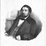 Johann Daniel Elster